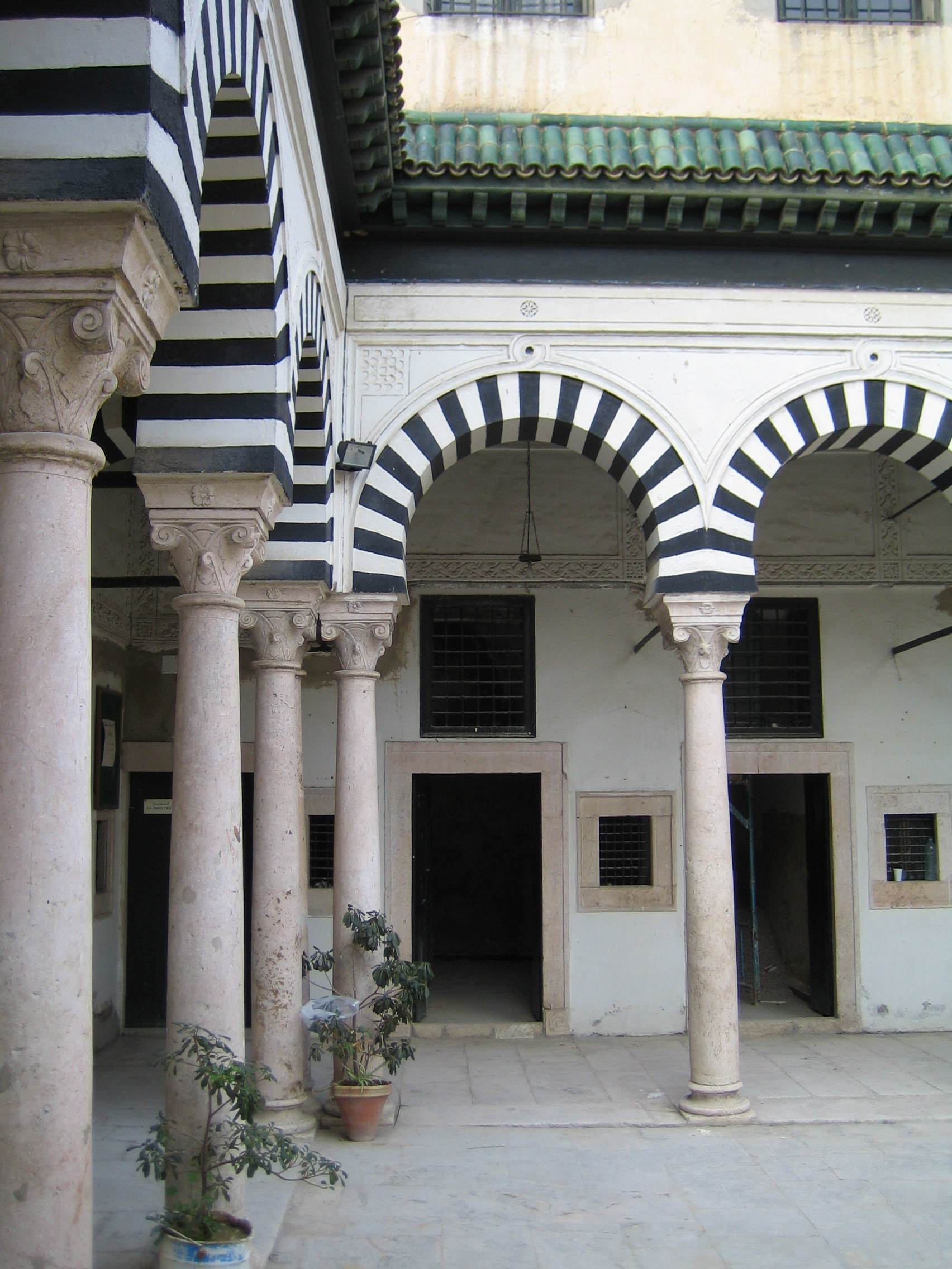 Médersa Slimaniya (1754) à Tunis